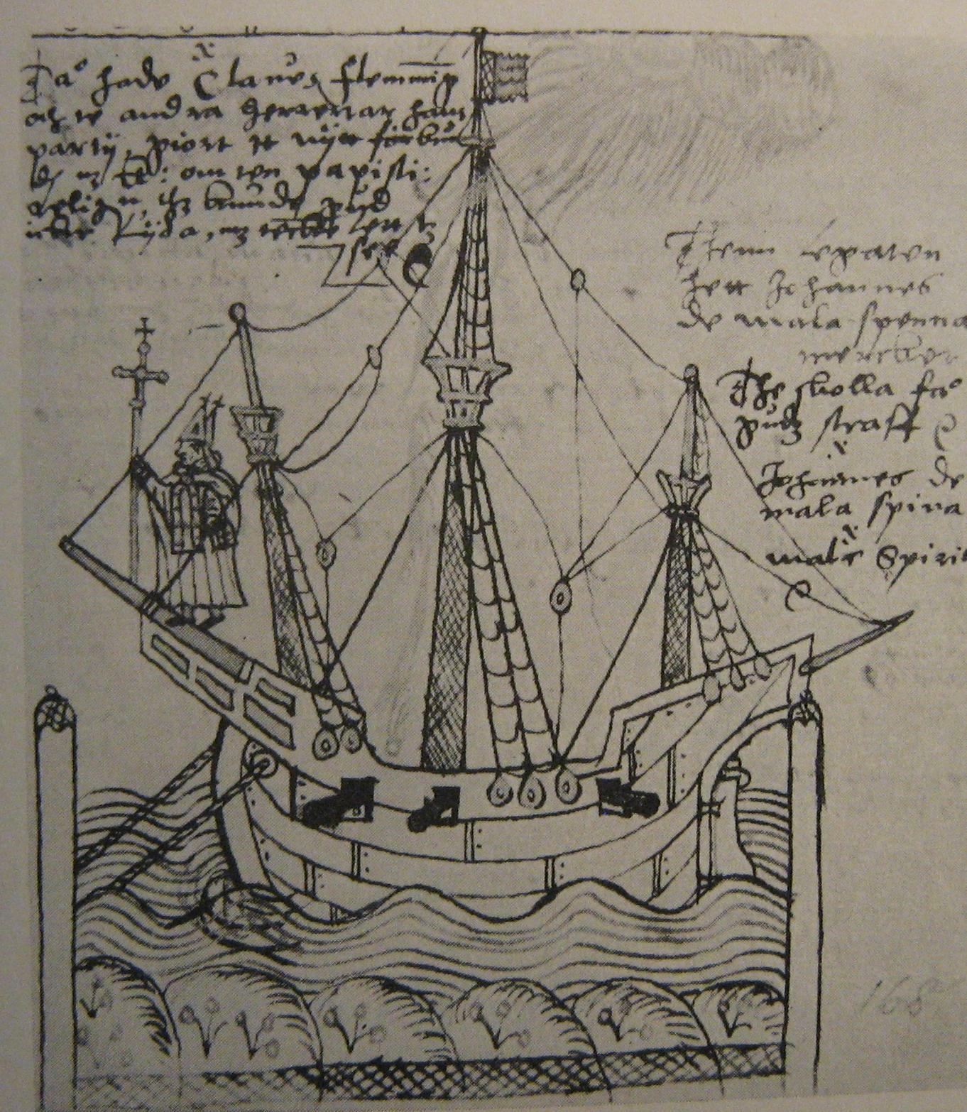 Ur Joen Petri Klints anteckningar om järtecken på kristi stundande åsterkomst. Bilden ovan visar "Tå hade Clause Flemming och ta andra herrarne, hans parti, gjort it nytt förbundh med k. om ten papisti religion, thet kunde gud icke lijda, med tet see. Thenn legaten hett johanne de mala spenna. Mercker: The skolla få guds staff. Johanne de mala spina male spiritus".